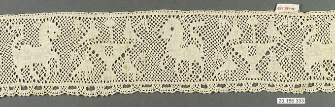 Italian (Pescocostanzo, Abruzzi); Edging; Textiles-Laces